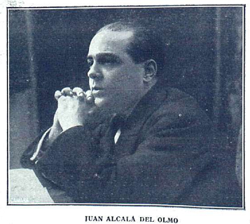 Retrato de Juan Alcalá del Olmo, ilustración publicada en la revista española La Esfera.